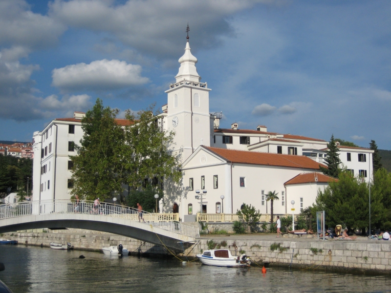 Crkva Uznesenja Blažene Djevice Marije, Crikvenica, Croatia